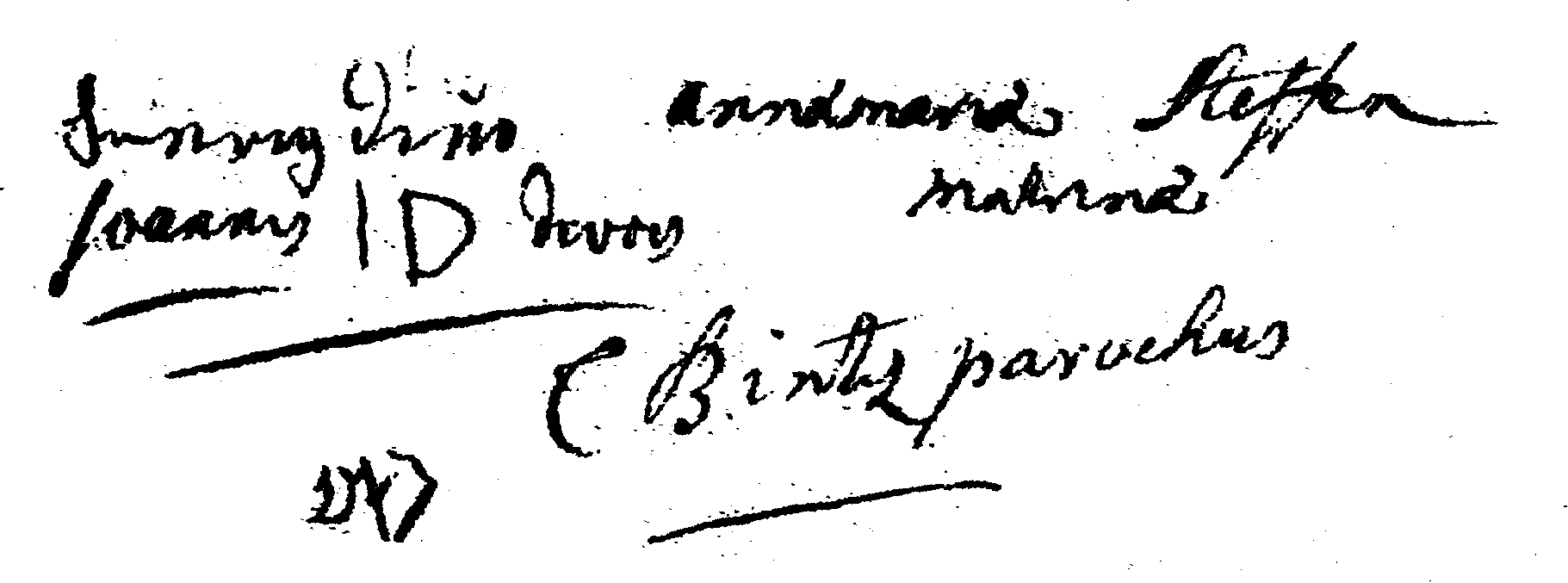 Eintrag einer Taufe in einem Kirchenbuch, bei dem der schreibunkundige Vater als Handzeichen ein "ID" machte; die Unterschrift des Pfarrers beglaubigte die Unterschrift.